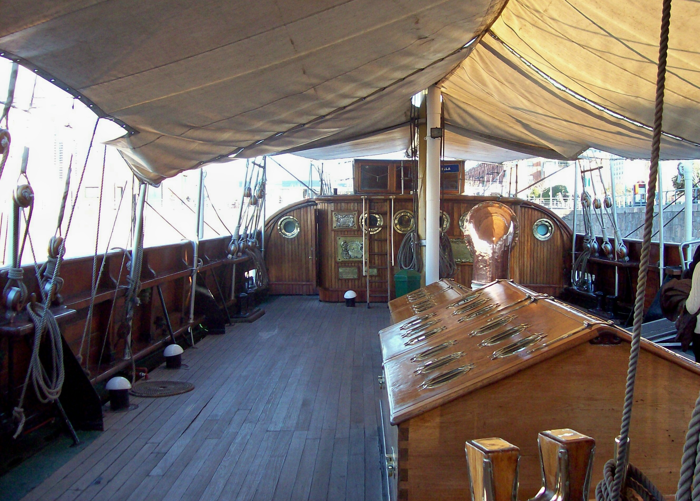 Buque Museo Corbeta A.R.A. Uruguay en puerto Madero, Buenos Aires. Foto en cubierta mirando a popa.